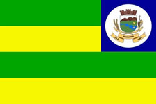 Bandeira da cidade Araguainha-MT